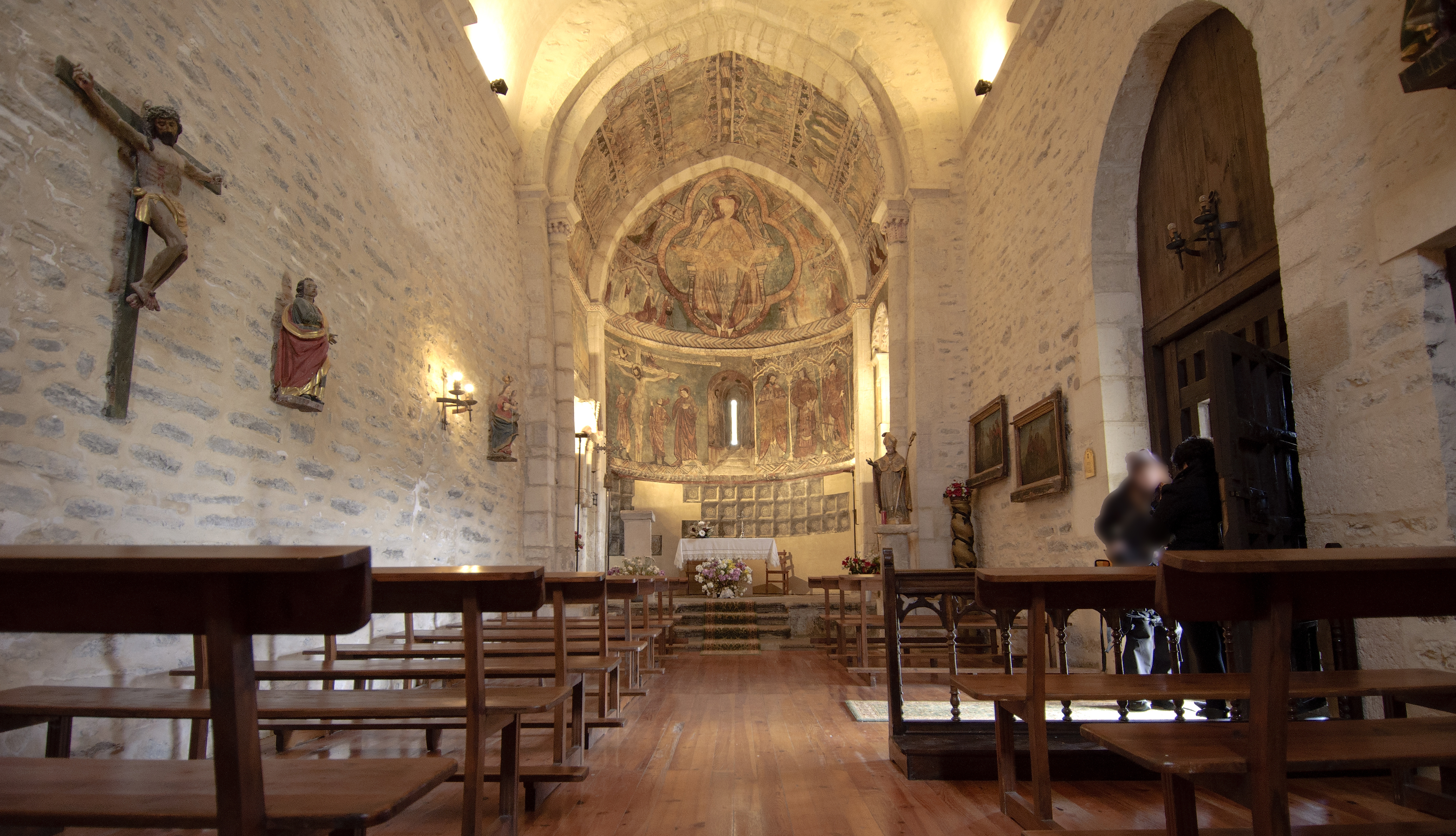 Vista interior de esta desconocida y poco visitada iglesia en el pueblecito de Alaves de Gaceo , se pueden observar unas preciosas pinturas encontradas detrás del retablo en los años 60, son Góticas del SXIV y únicas en todo el Pais Vasco. Se ofrecen visitas guiadas desde cercano pueblo de Salvatierra, que se acompaña de alguna otra joya de la zona.